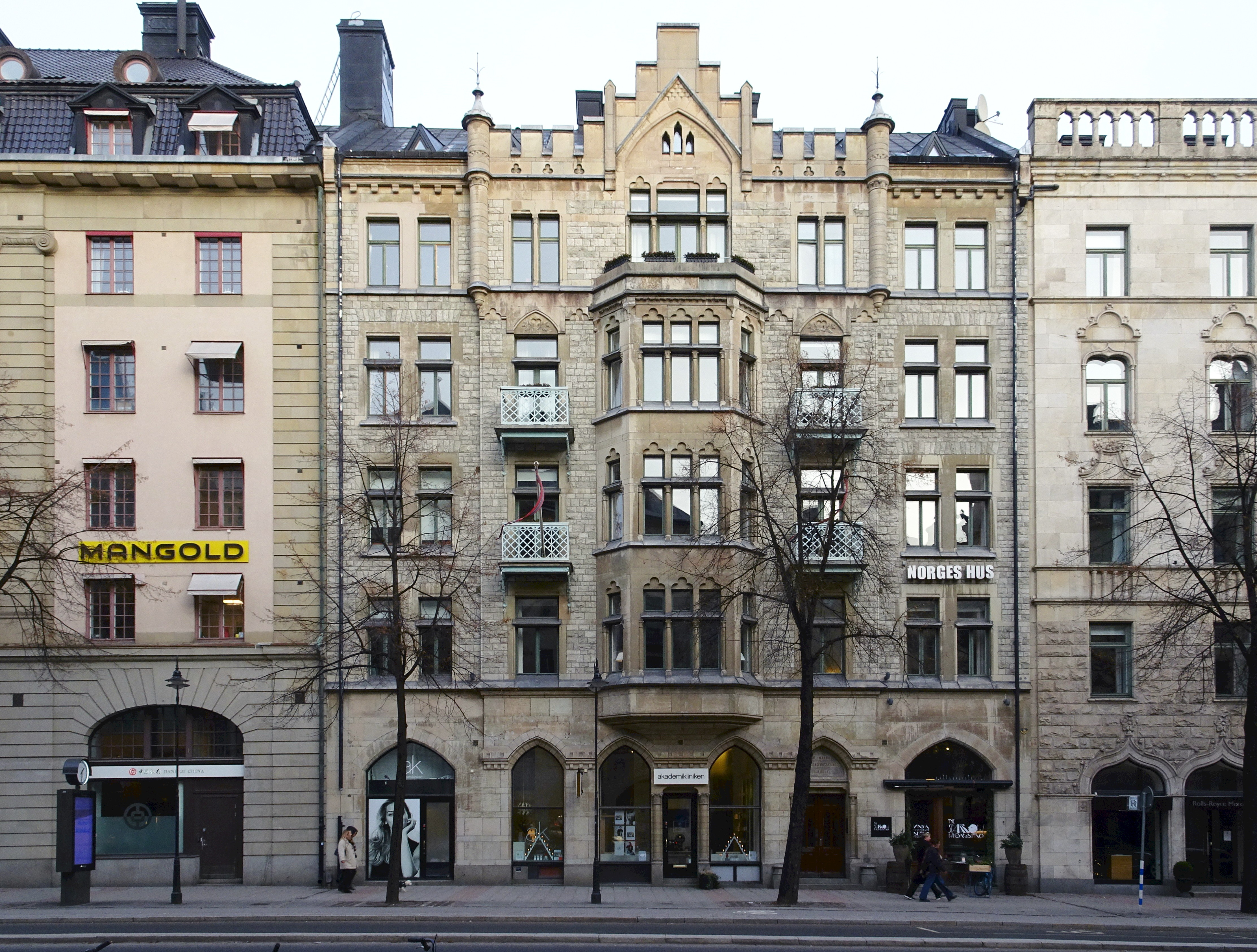 Landbyska verket 4, Birger Jarlsgatan 26, Nybyggnadsår 1897 - 1899, Axel Edengren (Byggmästare) C. G. Grip (Byggherre) Erik Boström (Byggherre) Erik Boström (Arkitekt)